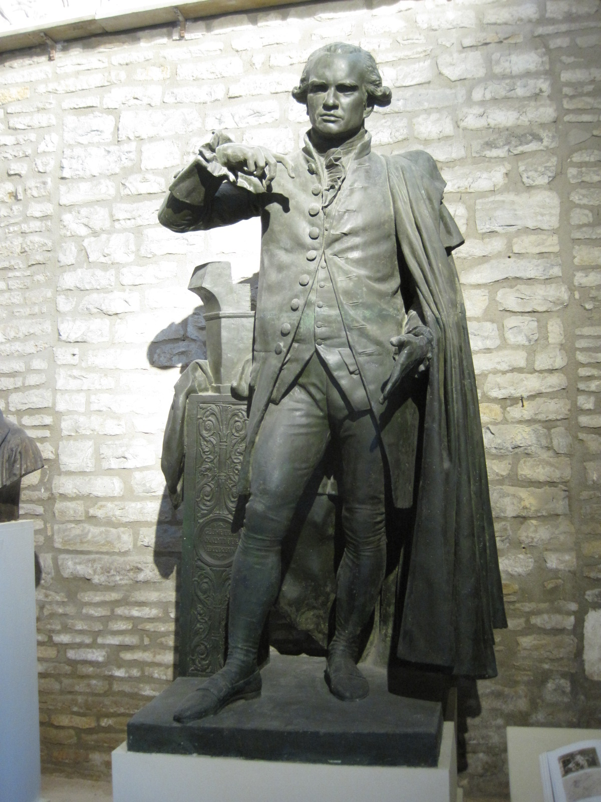 Musée François Rude de Dijon - Le mathématicien Gaspard Monge - 1849 - Plâtre surmoulé